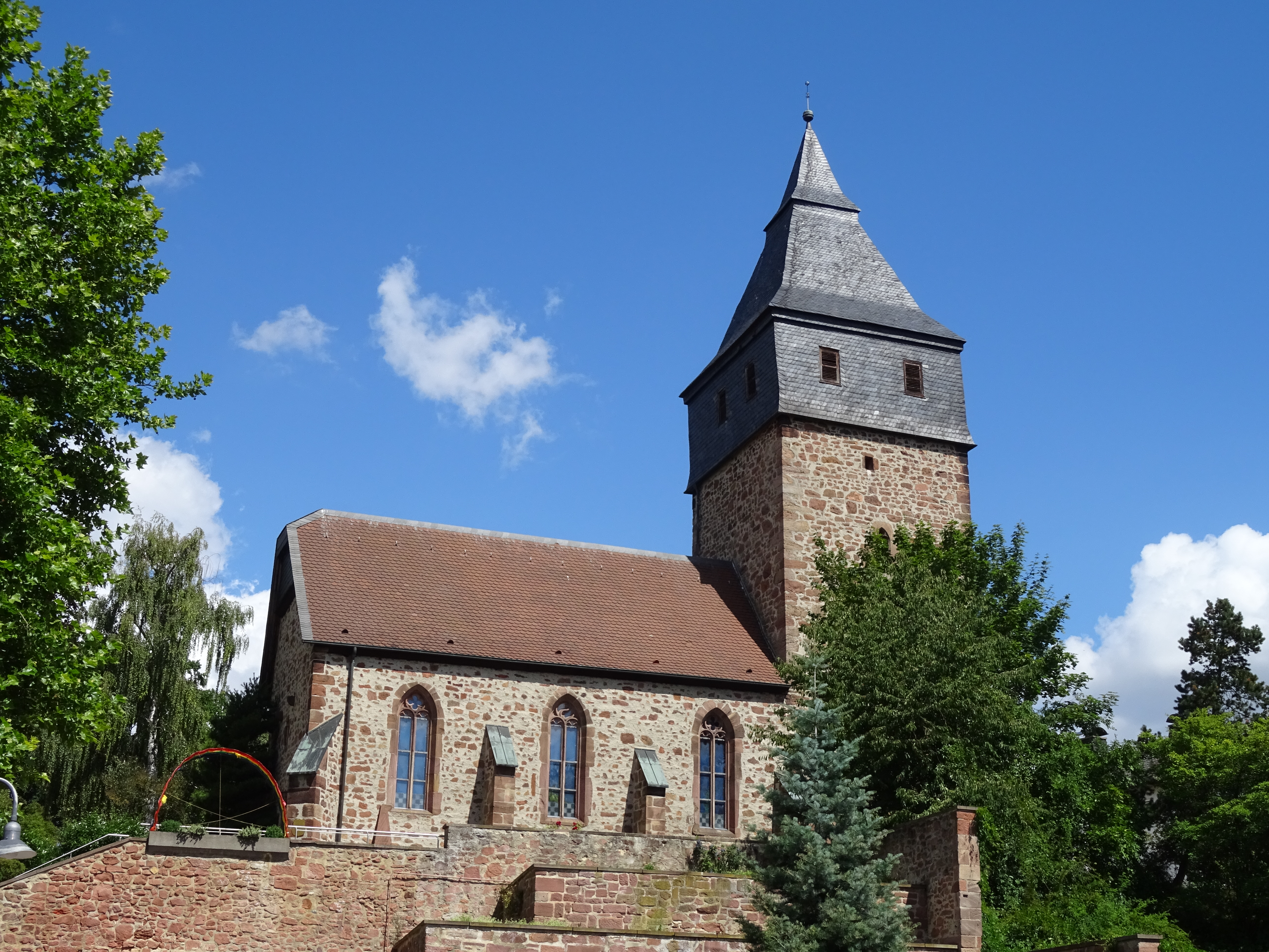 Kirchengebäude